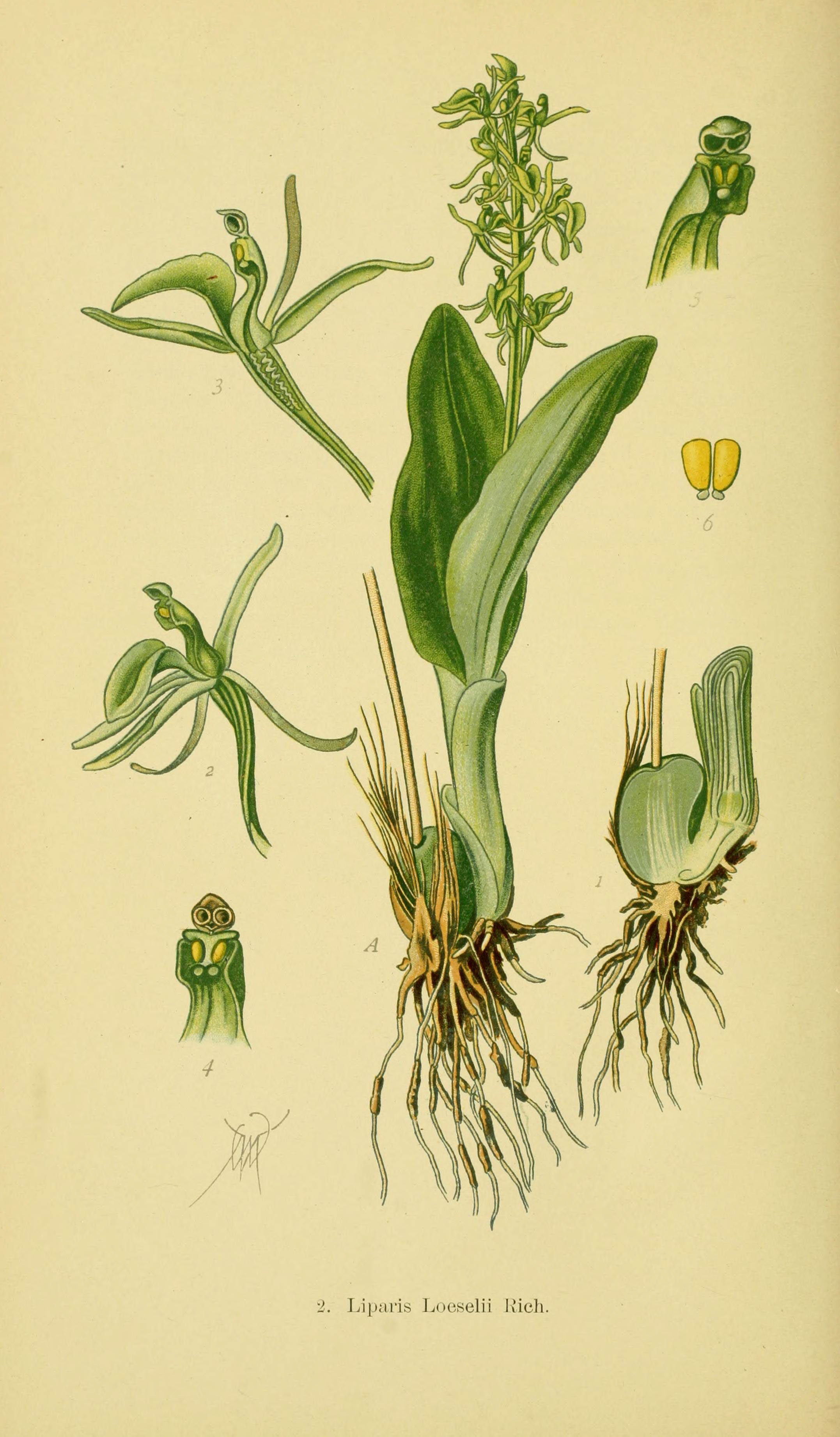 ■2. Liparis Loeselii Rieh.